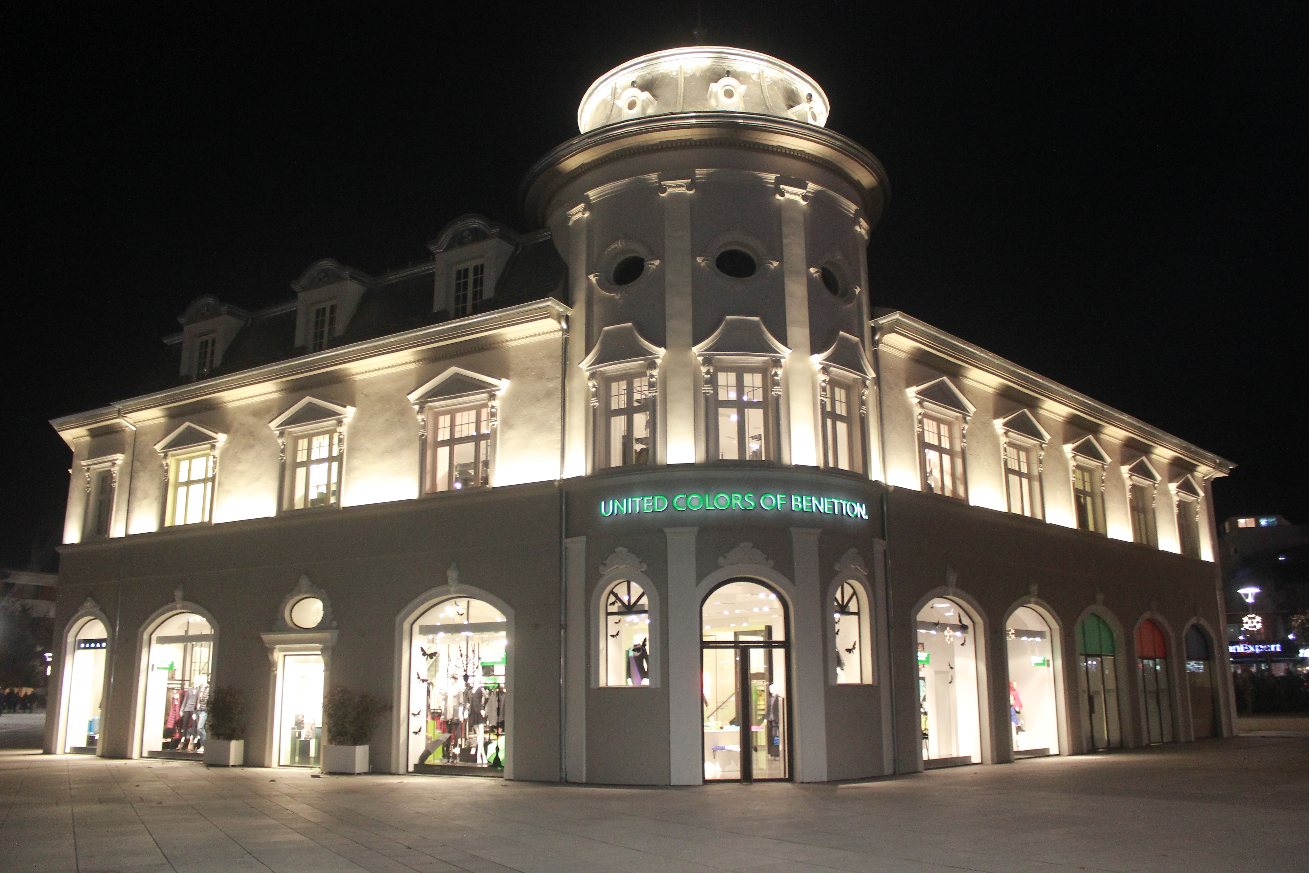 Objekti i restauruar i Hotel Unionit në Prishtinë